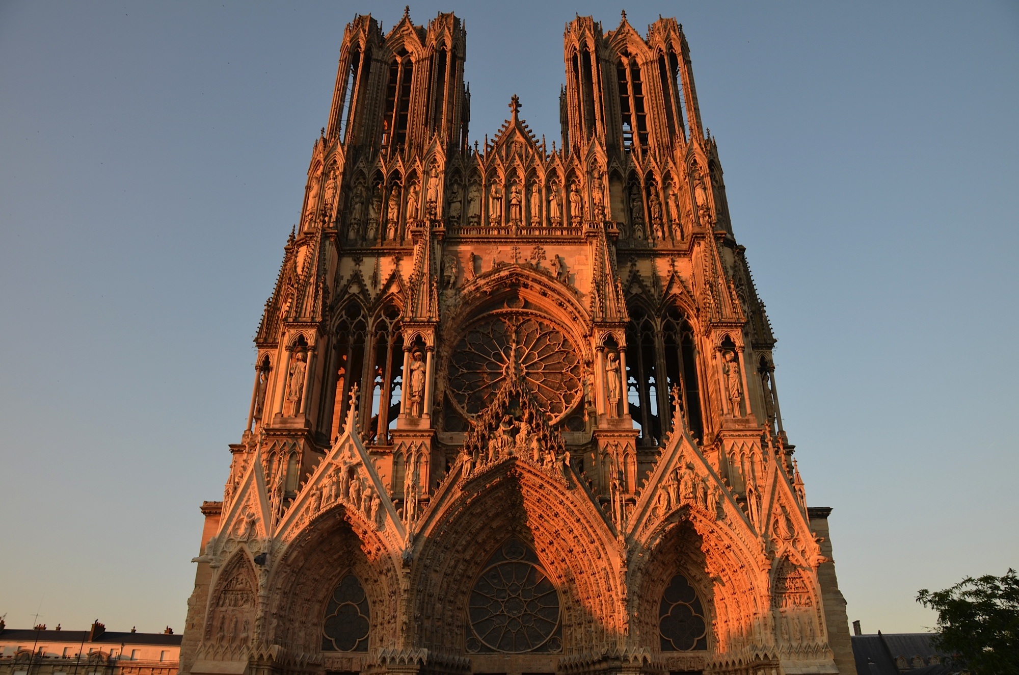 La cathédrale et son parvis